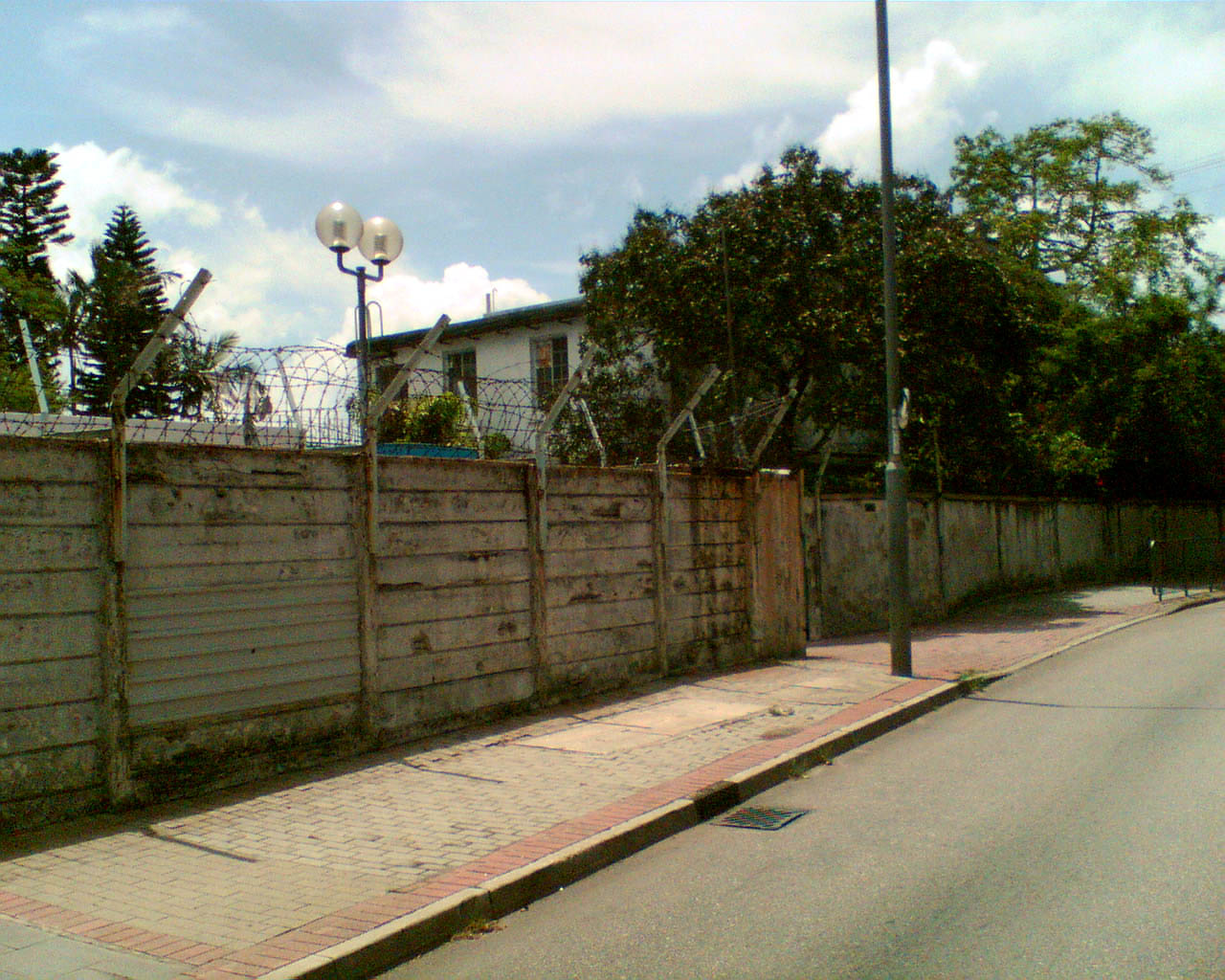 中文（香港）: 殘舊破落的白屋。